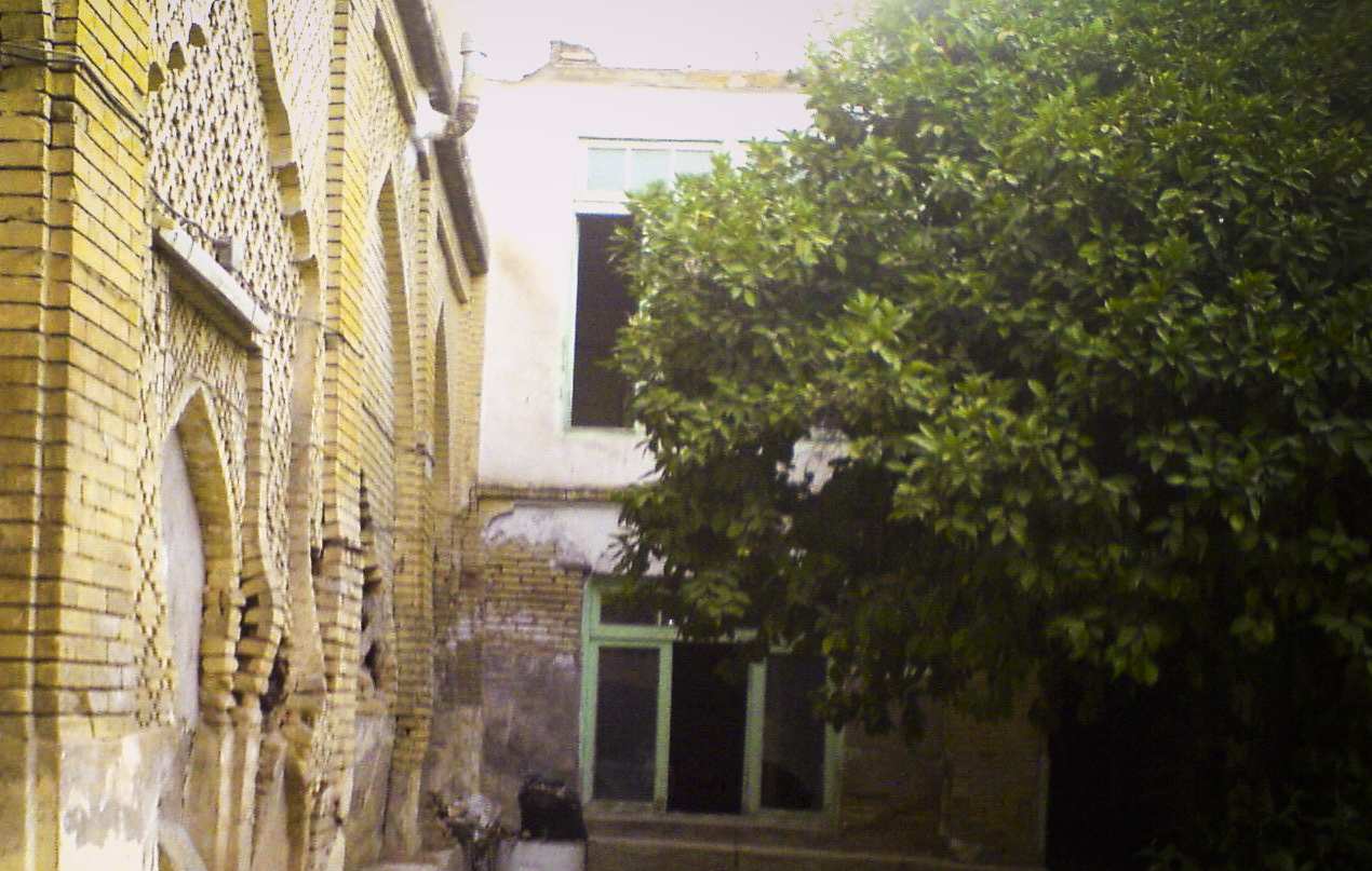 درختان بزرگ مرکبات